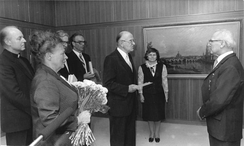 ADN-ZB 25.8.82 Berlin: Honecker-Geburtstag. Für den Bund der Evangelischen Kirchen in der DDR überbrachte der Vorsitzende der Konferenz der Kirchenleitungen, Bischof D. Dr. Werner Krusche (Mi.), die herzlichsten Glückwünsche. Weiter v.l.n.r.: Bischof Werner Leich, Christina Schultheiss, Joachim Rogge, Oberkirchenrat Ernst Petzold und Oberkirchenrätin Christa Lewek.